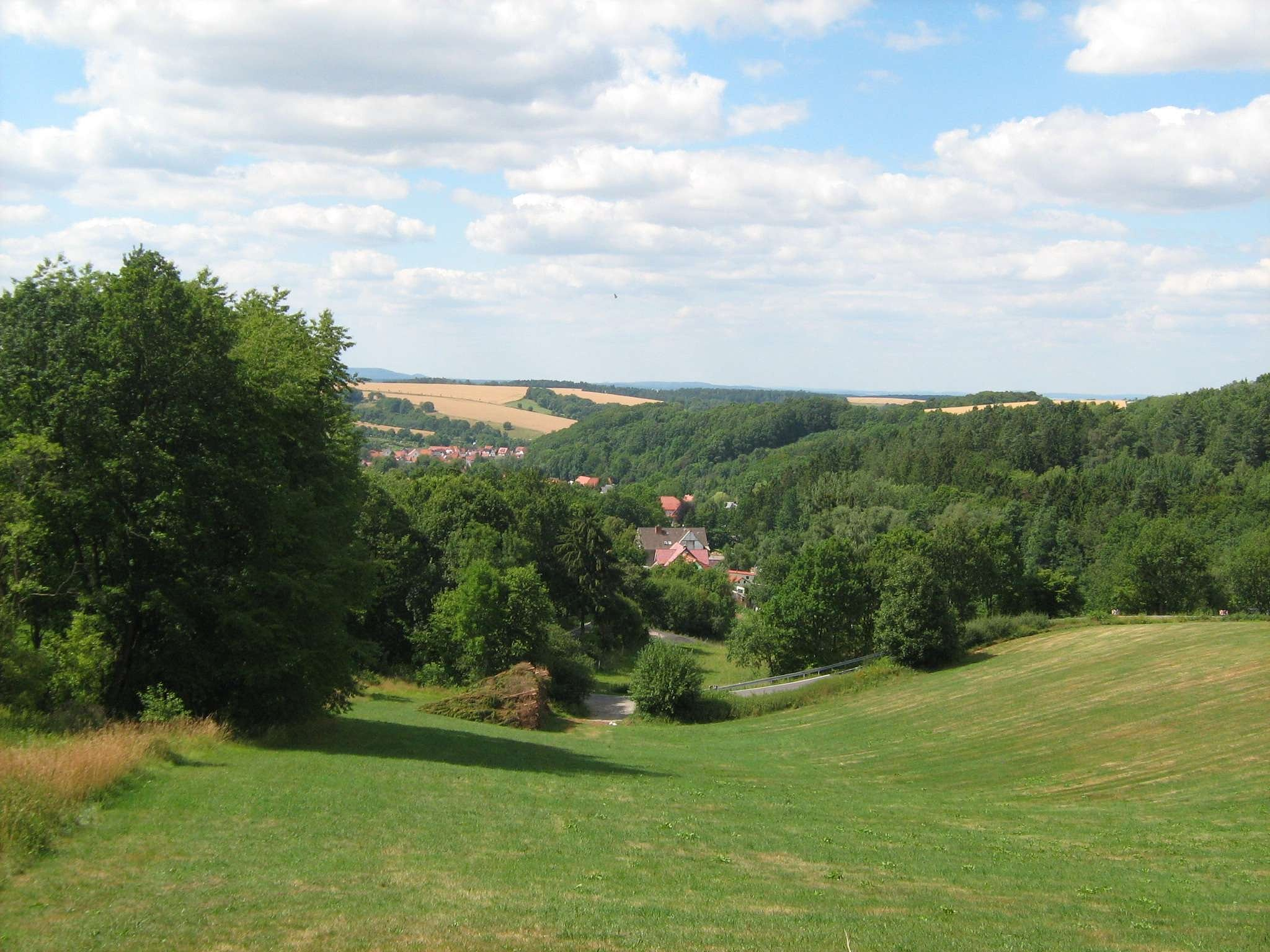 Blick von Süden auf Hundeshagen im Eichsfeld